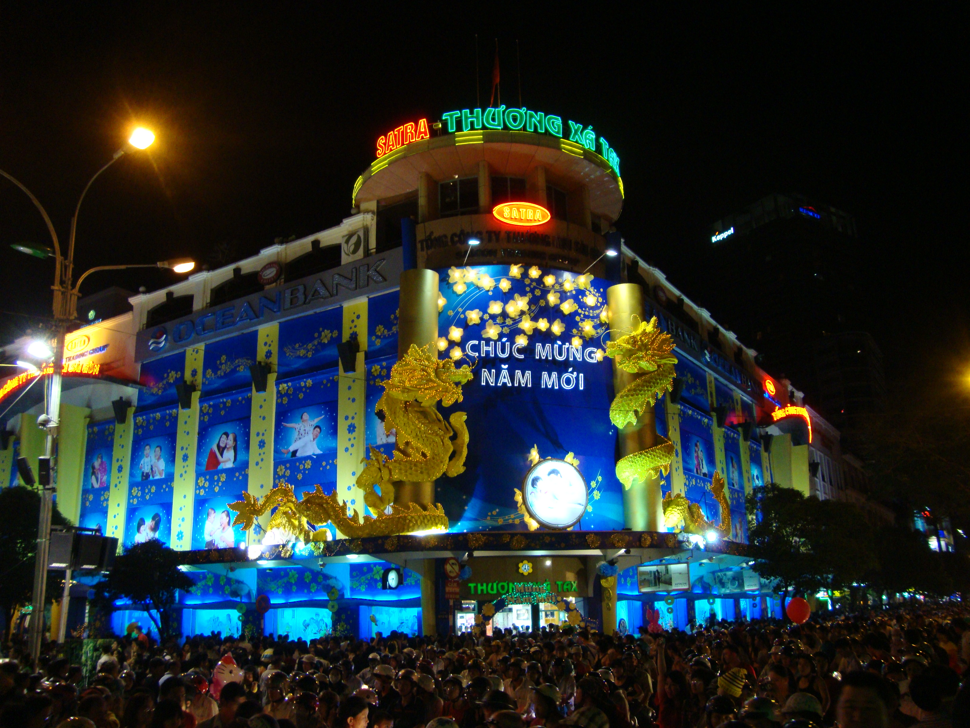 Thương xá TAX vào dịp Tết Nhâm Thìn